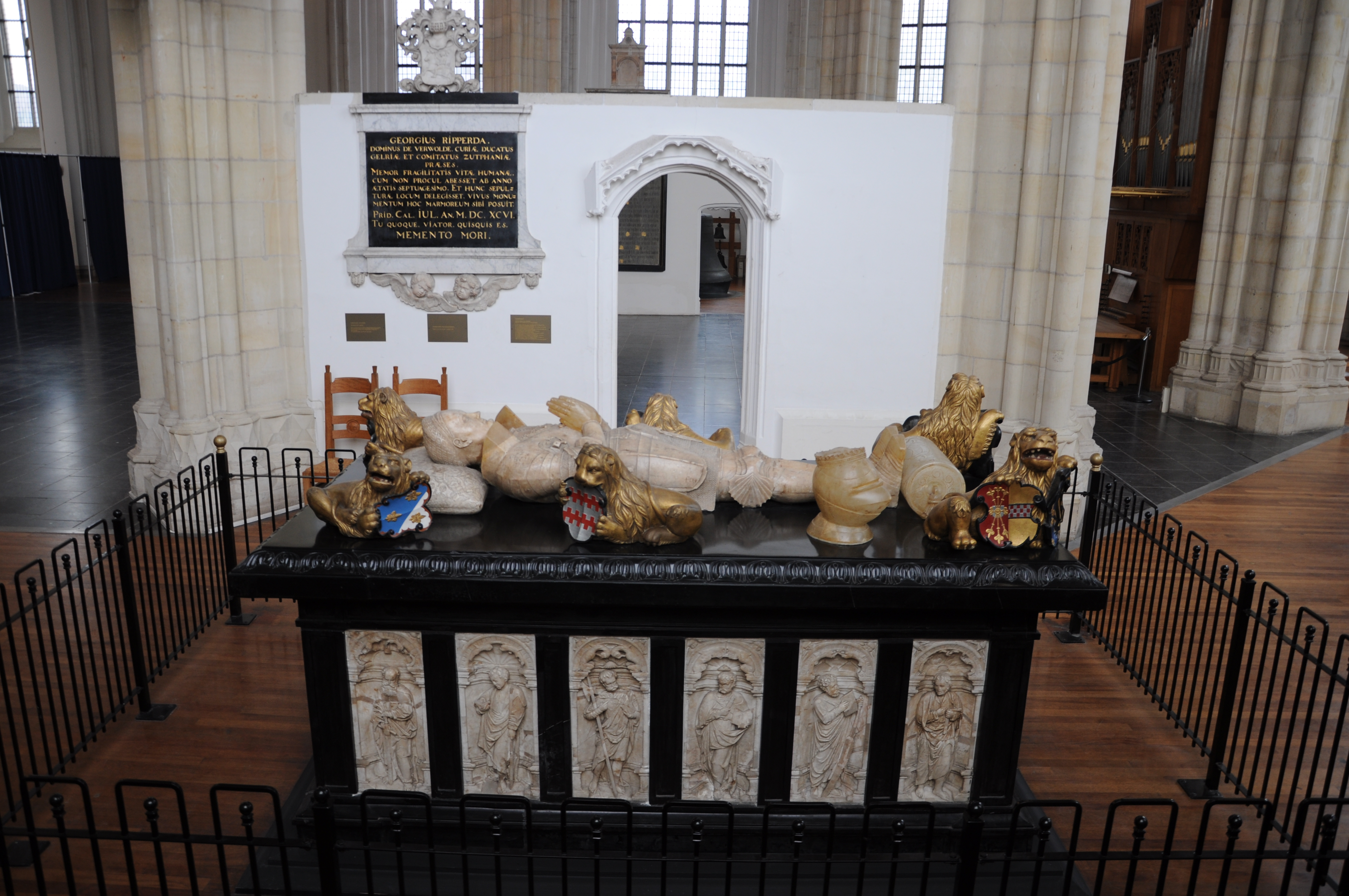 Praalgraf Karel van Egmond, hertog van Gelre en Zutphen in de Eusebiuskerk Arnhem. Marmeren tombe met albast reliëfs en beeldhouwwerk.